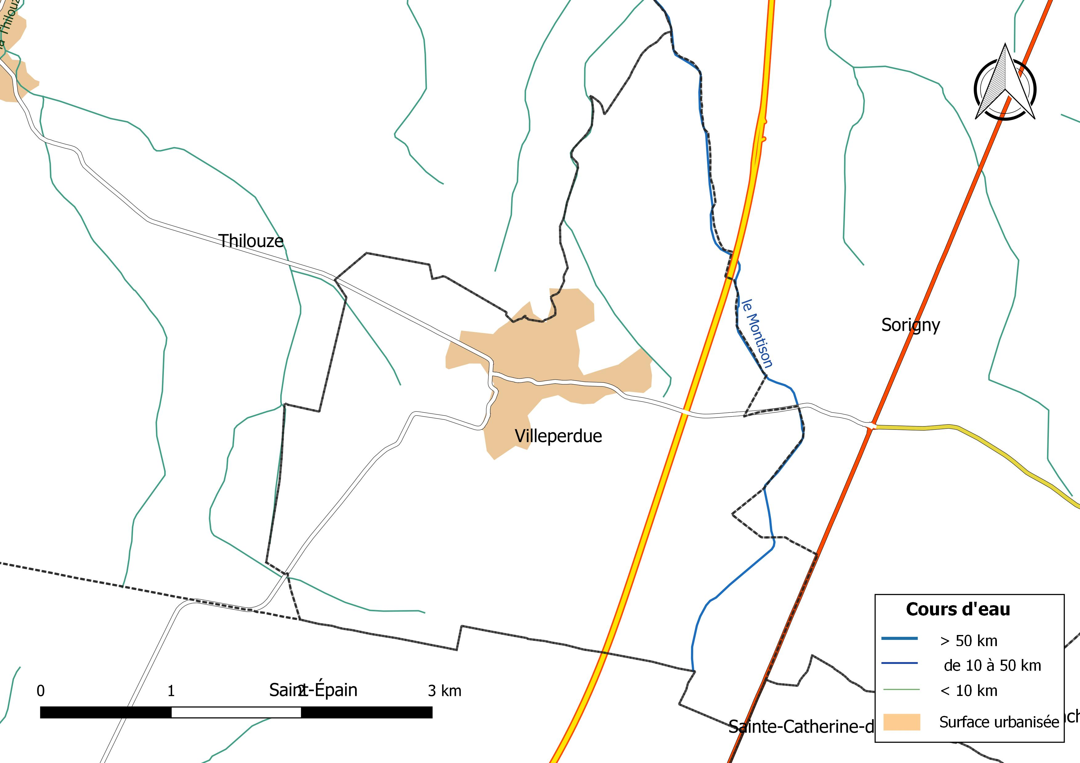 Carte du réseau hydrographique de la commune de Villeperdue (France).